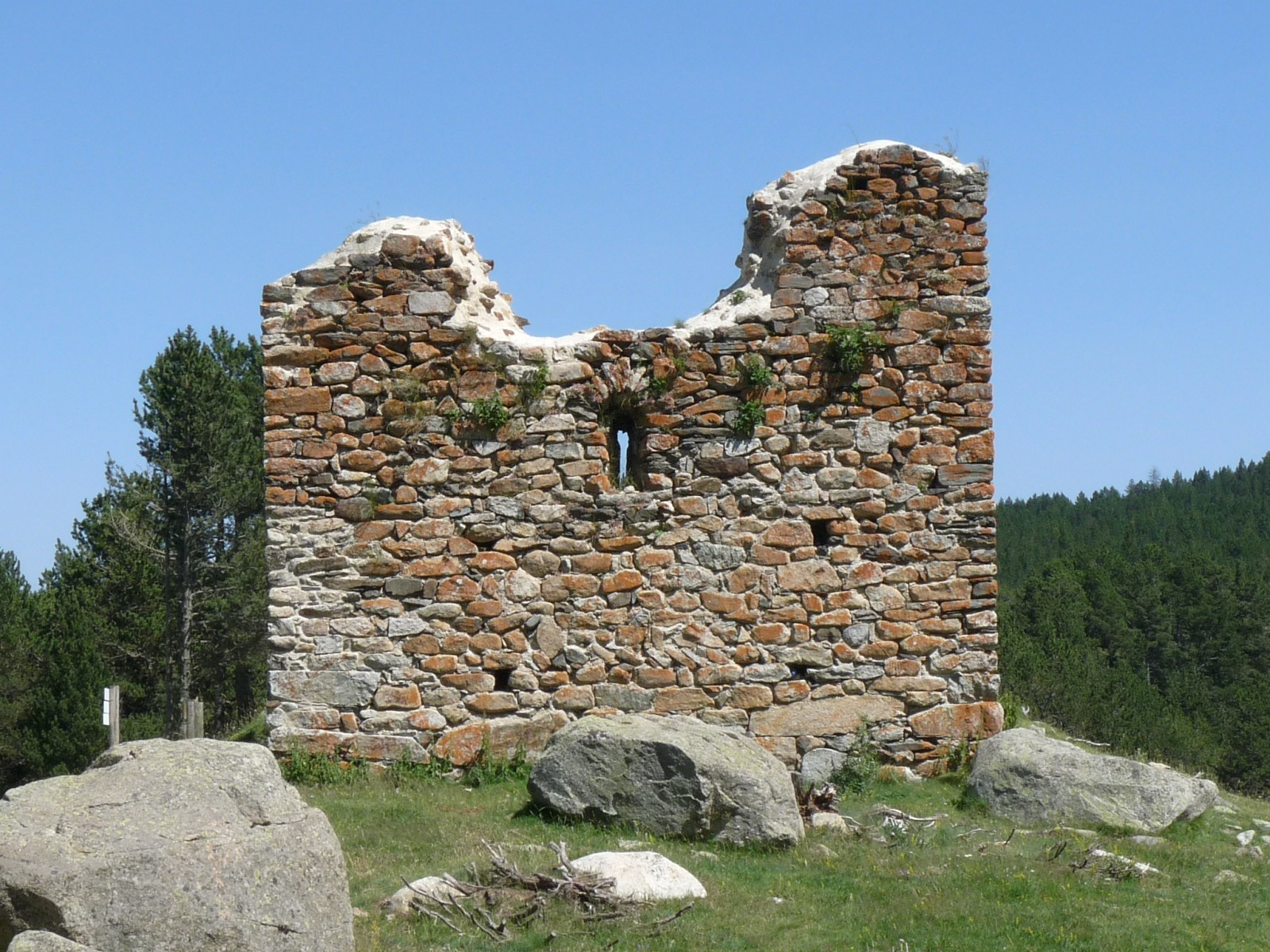 Ancienne église de Balcère, Les Angles, Pyrénées-Orientales, France